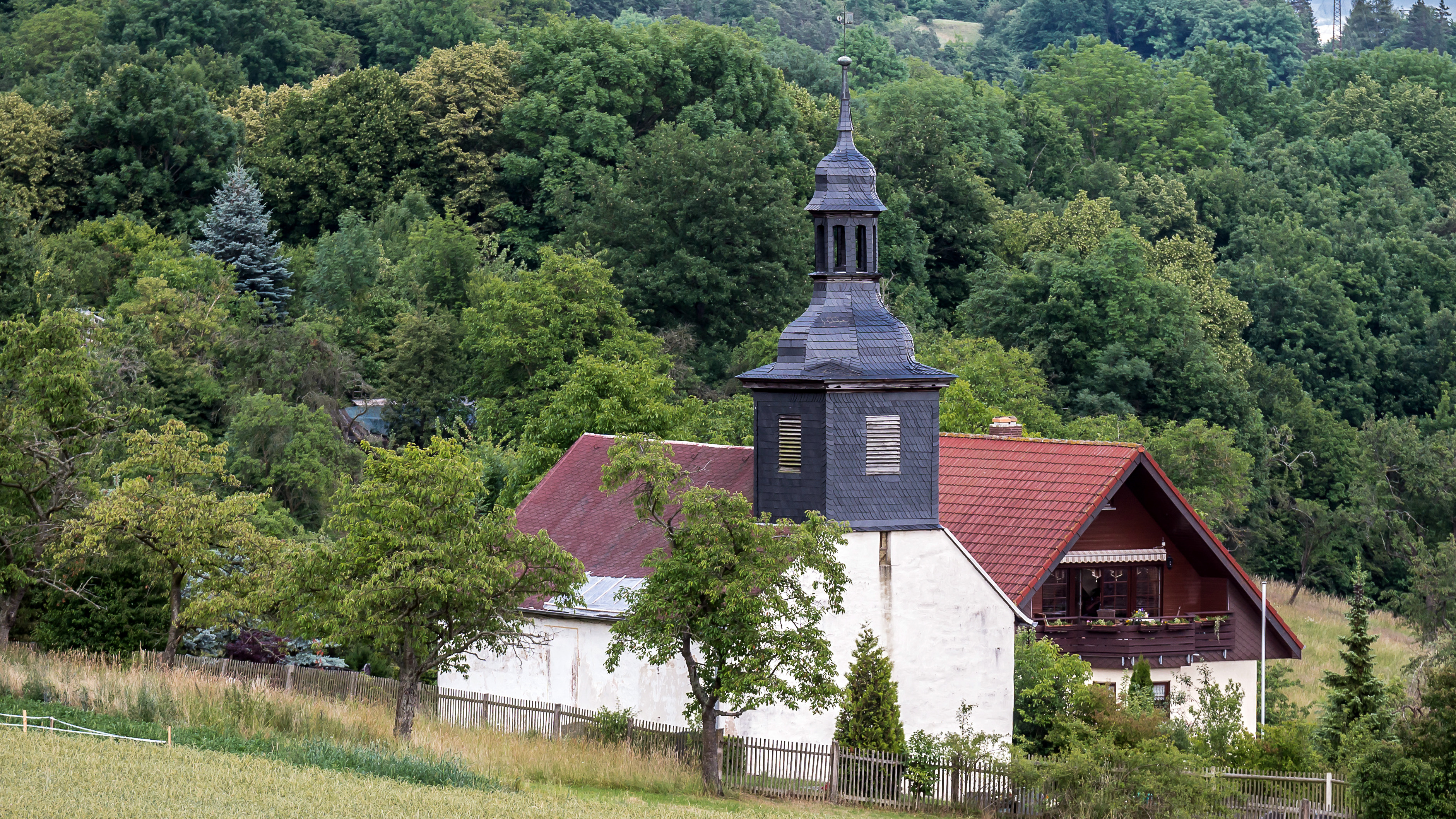 FFH Gebiet DE-5233-302 Fledermauswochenstuben Kleingölitz, Wochenstube der Kl. Hufeisennase (Rhinolophus hipposideros) in Dachboden und Turm der Kirche, Wochenstube der Mopsfledermaus (Barbastella barbastellus) , am 'Artenschutzturm', Jagdhabitate in direkter Nähe, funkt. Zusammenhang zu (Schwarzatal) und (Muschelkalk-Landschaft westlich von Rudolstadt)